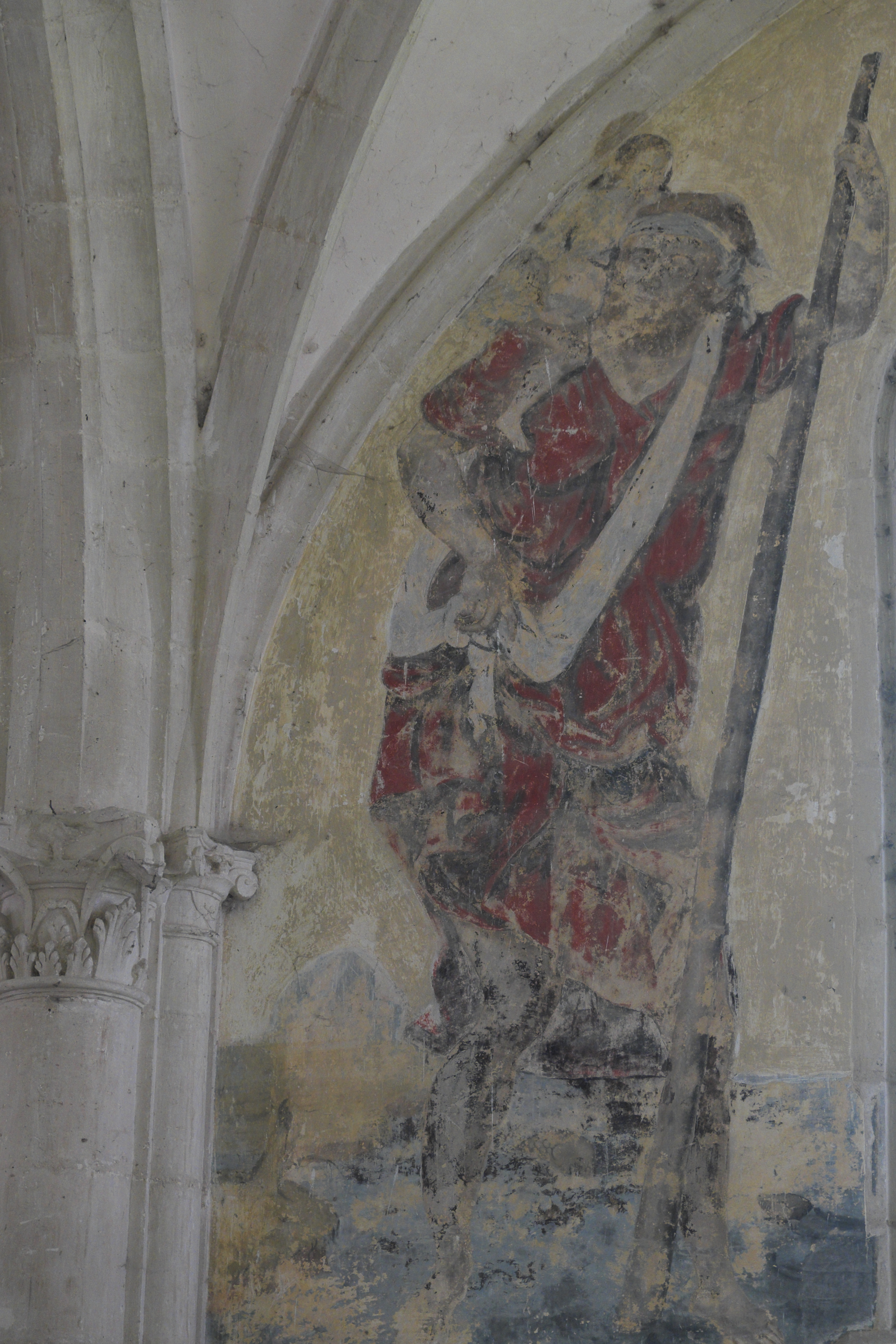 Katholische Kirche Saint-Remi in Ceffonds im Département Haute-Marne (Champagne-Ardenne/Frankreich), Wandmalerei aus dem 16. Jahrhundert, Darstellung: Hl. Christophorus .